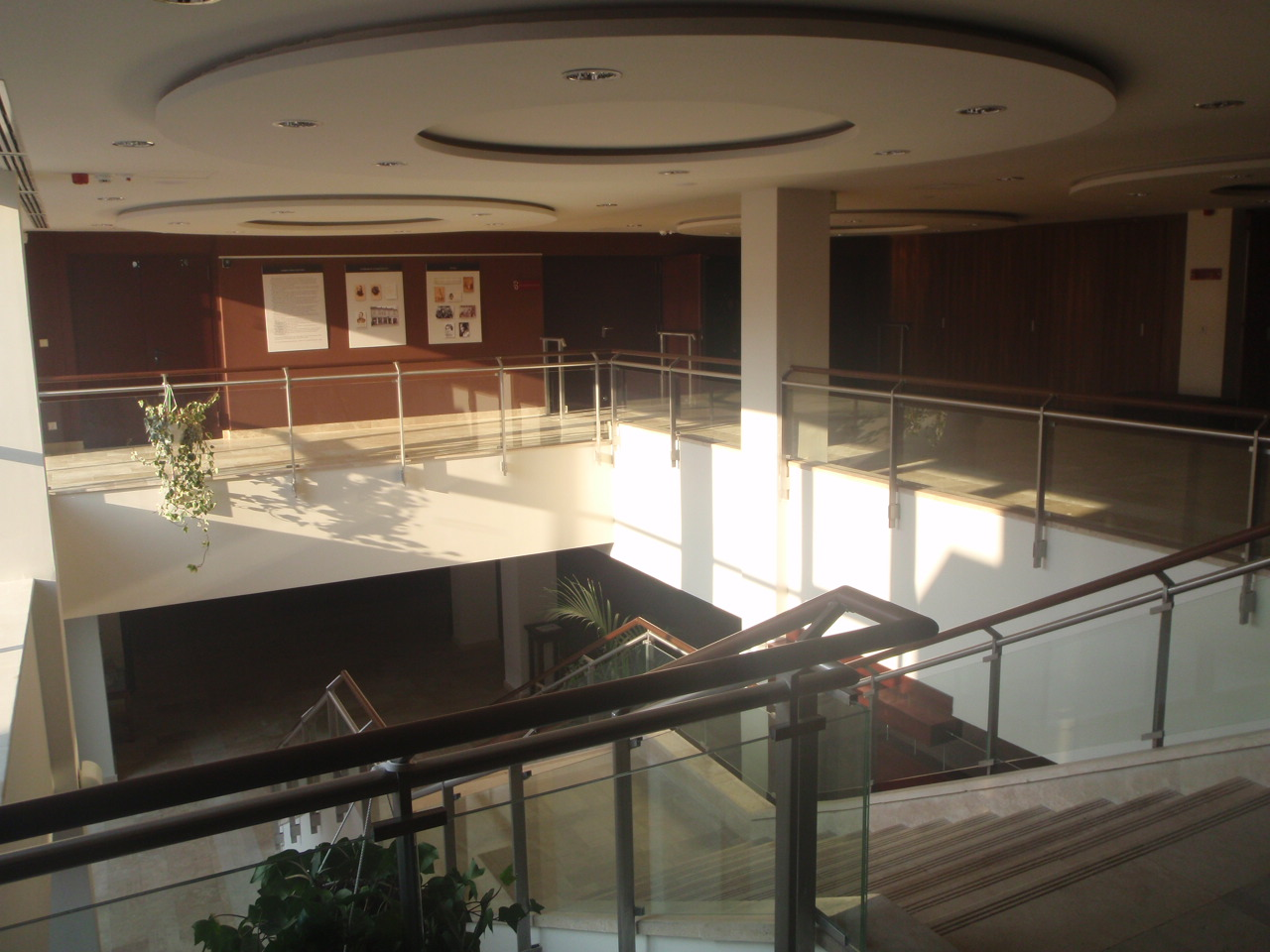 Szombathely, Weöres Sándor Színház (Akacs Mihály utca) előcsarnoka